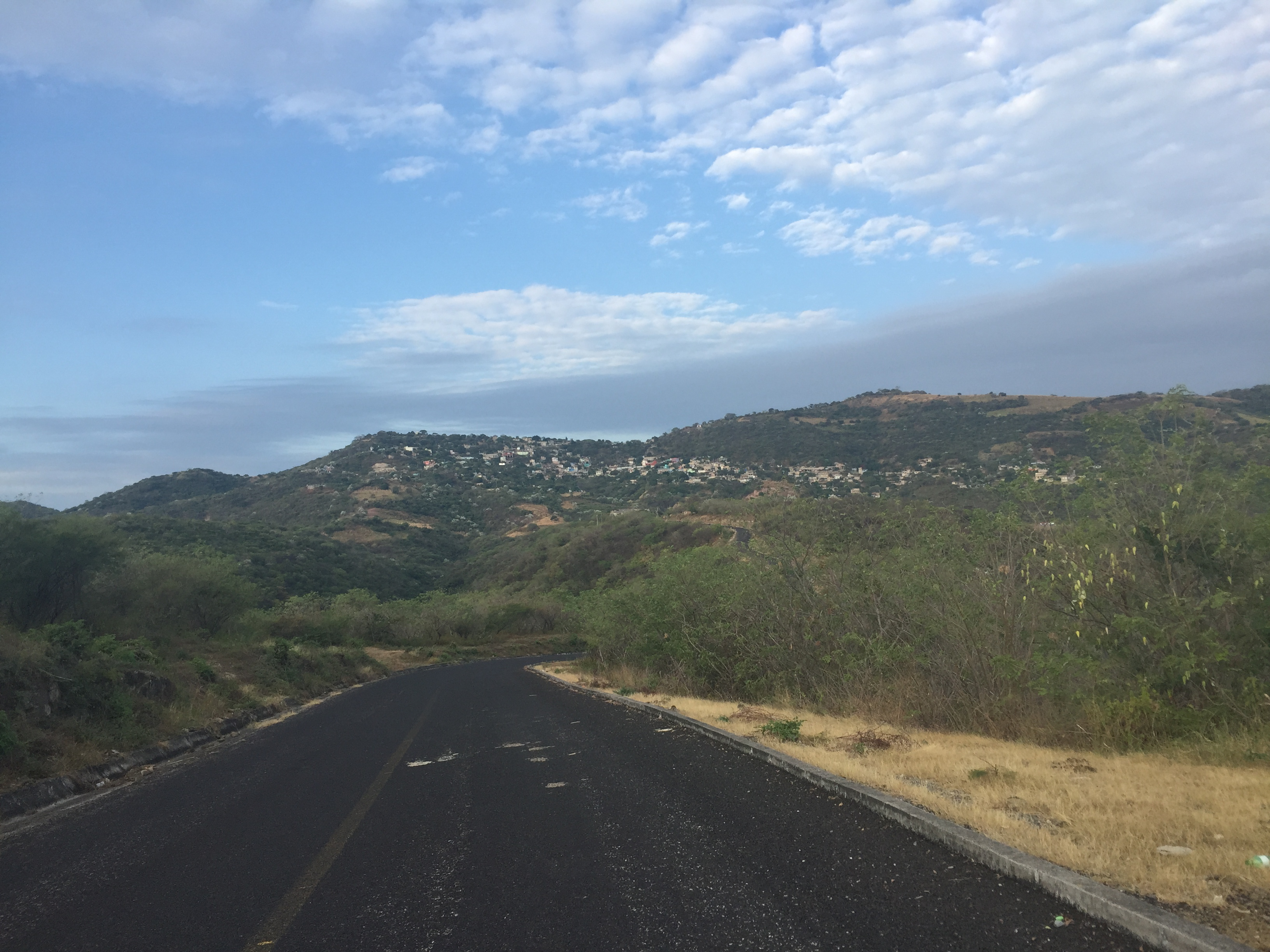 MAXELA